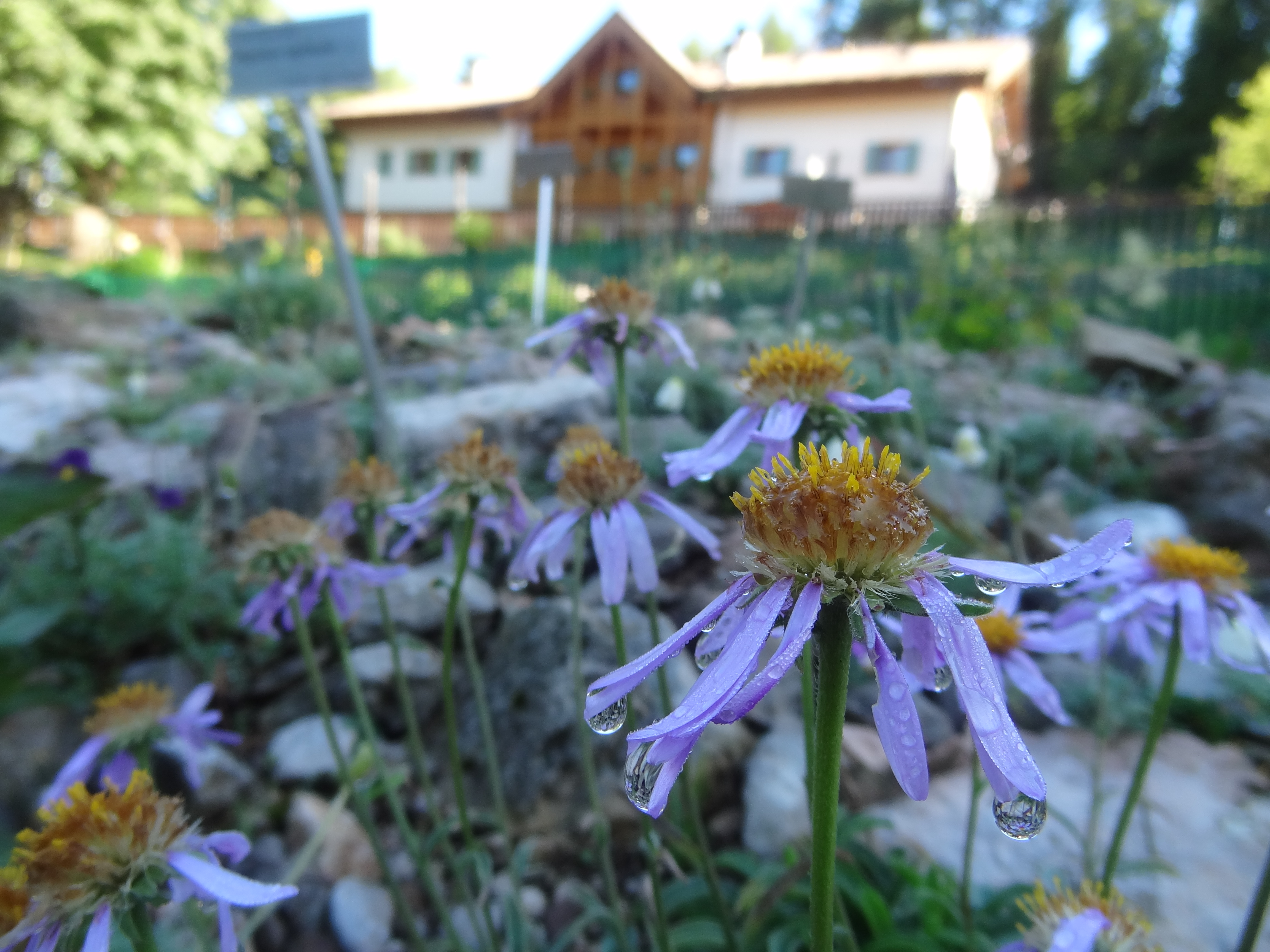 Giardino Botanico Alpino Viote, vista del Rifugio Viote